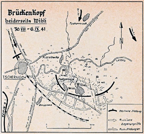 фото з музею